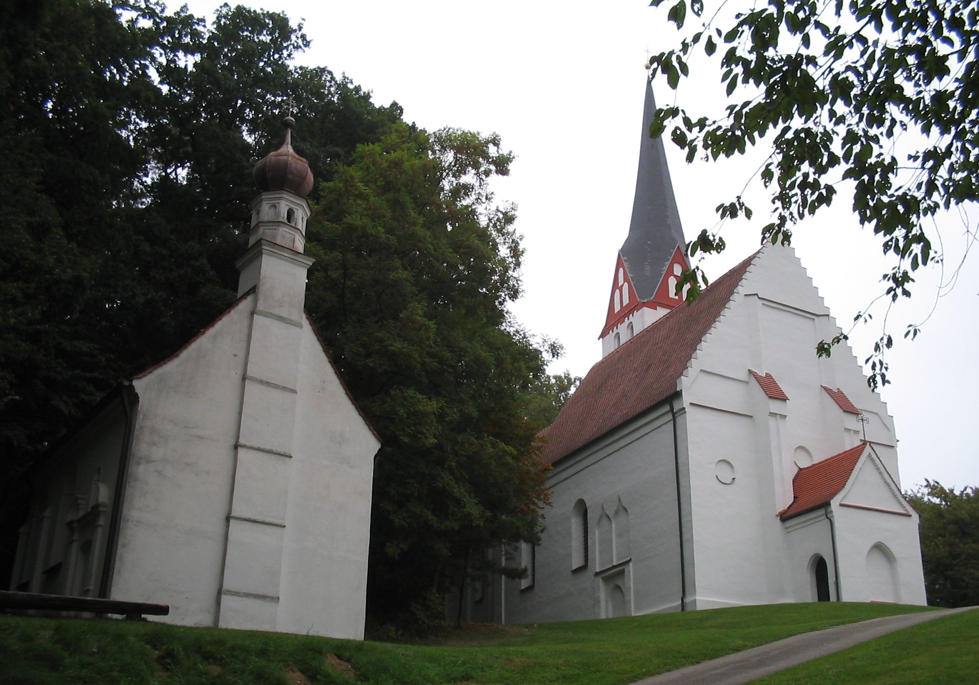 Links die Wallfahrtskapelle, rechts St. Kastulus in Sankt Kastl